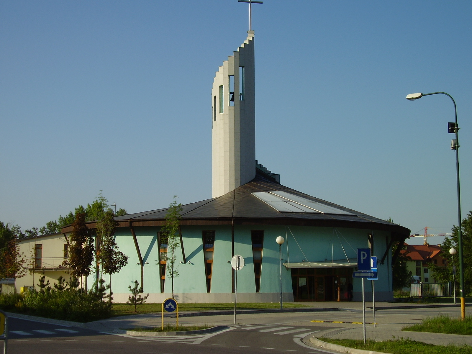 Kostol Sedembolestnej Panny Márie, Betliarska 3, Bratislava